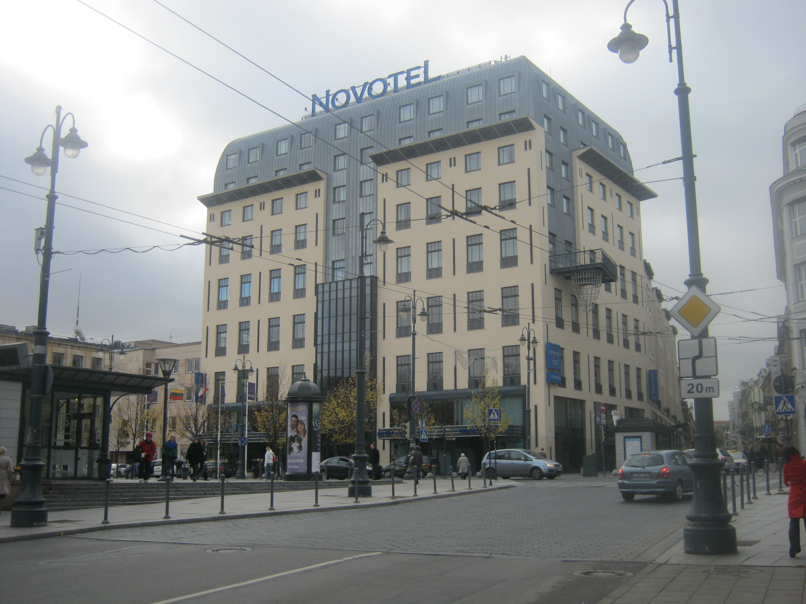 Novotel